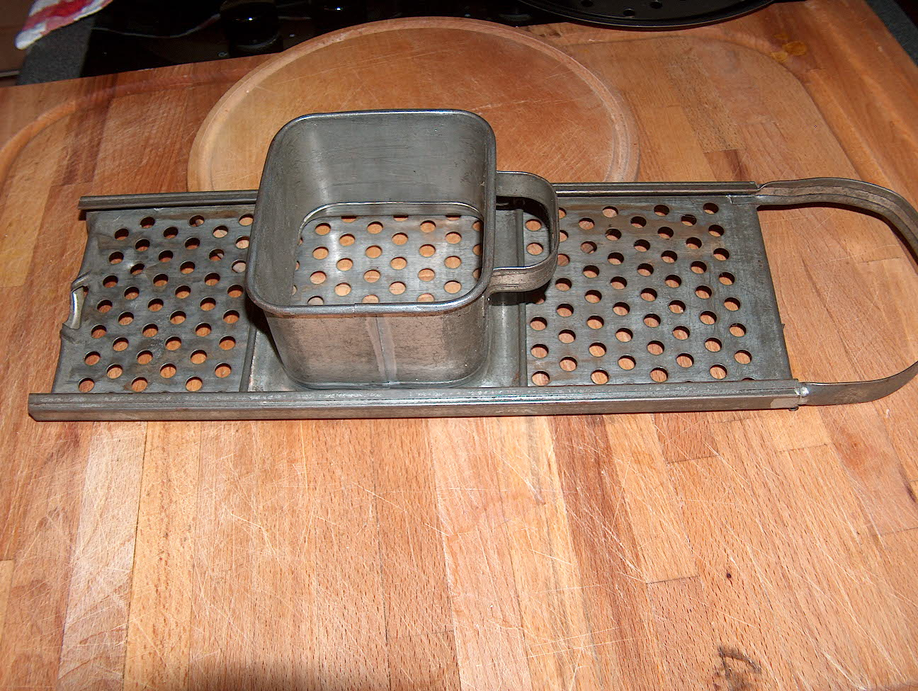 Spätzle-Hobel